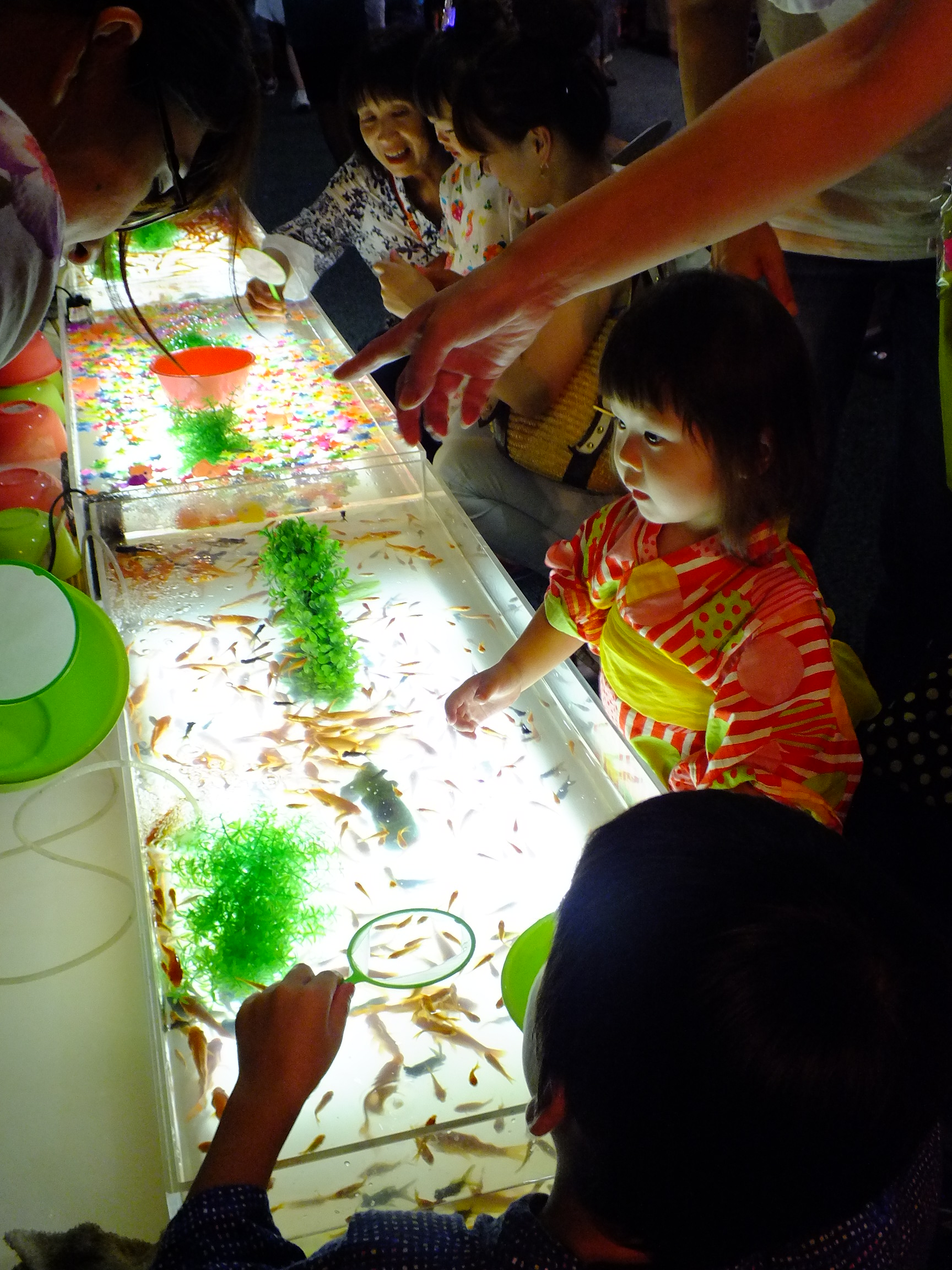 20140729 Ichijima-Kawasuso Matsuri 市島川裾祭（丹波市市島町）